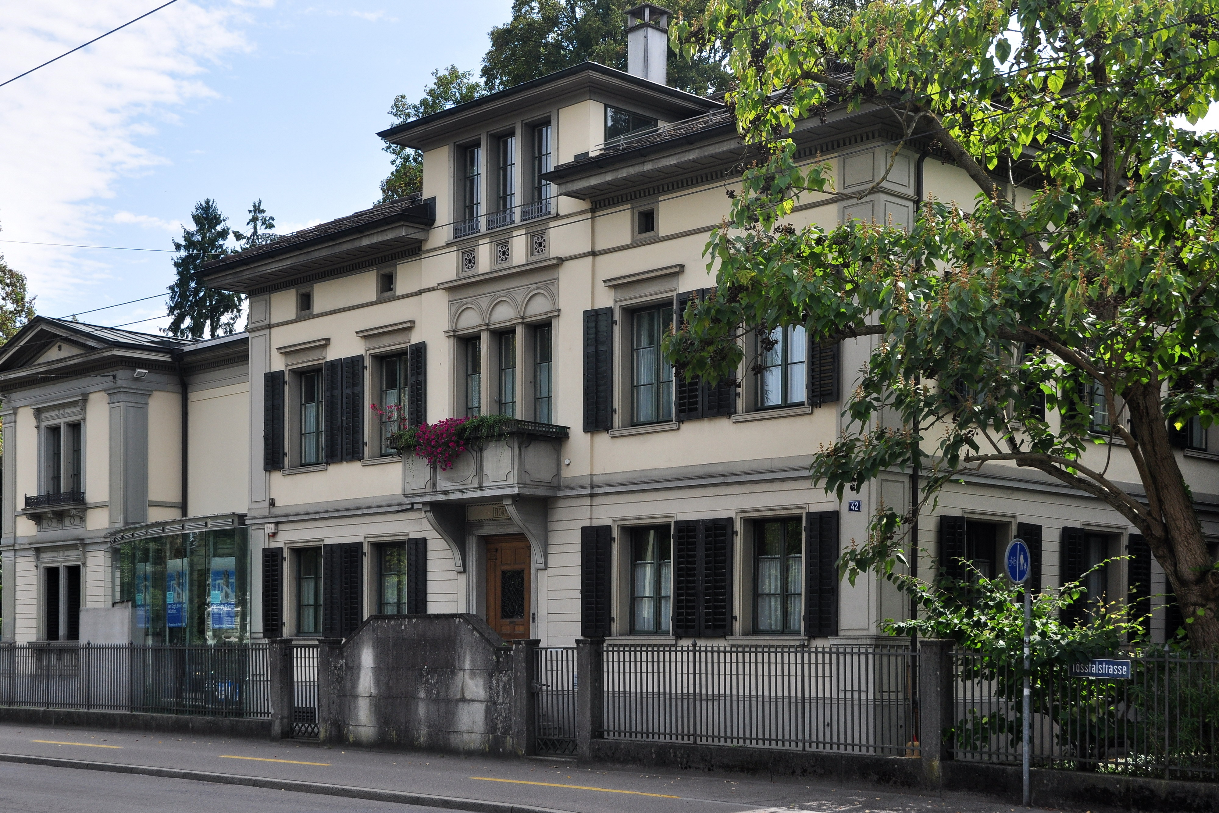 Sammlung Hahnloser in der Villa Flora, Tösstalstrasse 42, 44 in Winterthur (Switzerland)